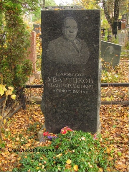 Памятник Уваренкову И.М. на на Новом (Новодевичьем) кладбище в городе Смоленске